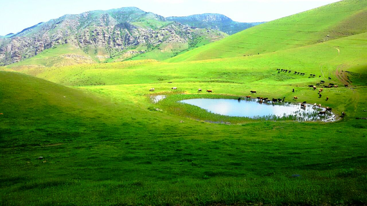 قالغانلو